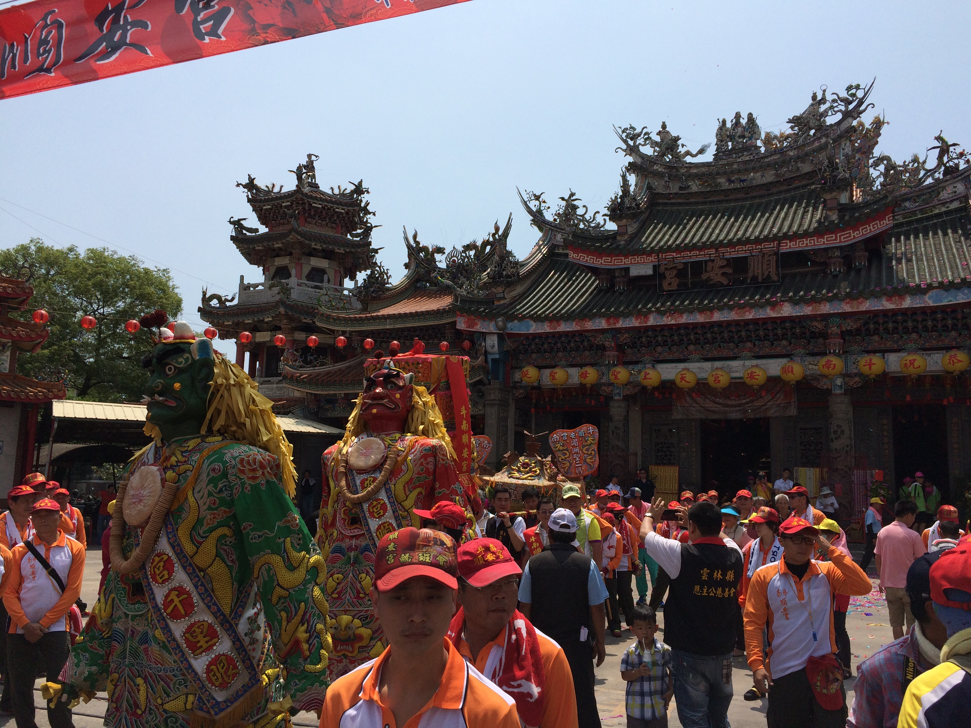 中文（台灣）: 中華民國104年斗南順安宮聖二媽出巡祈安繞境。